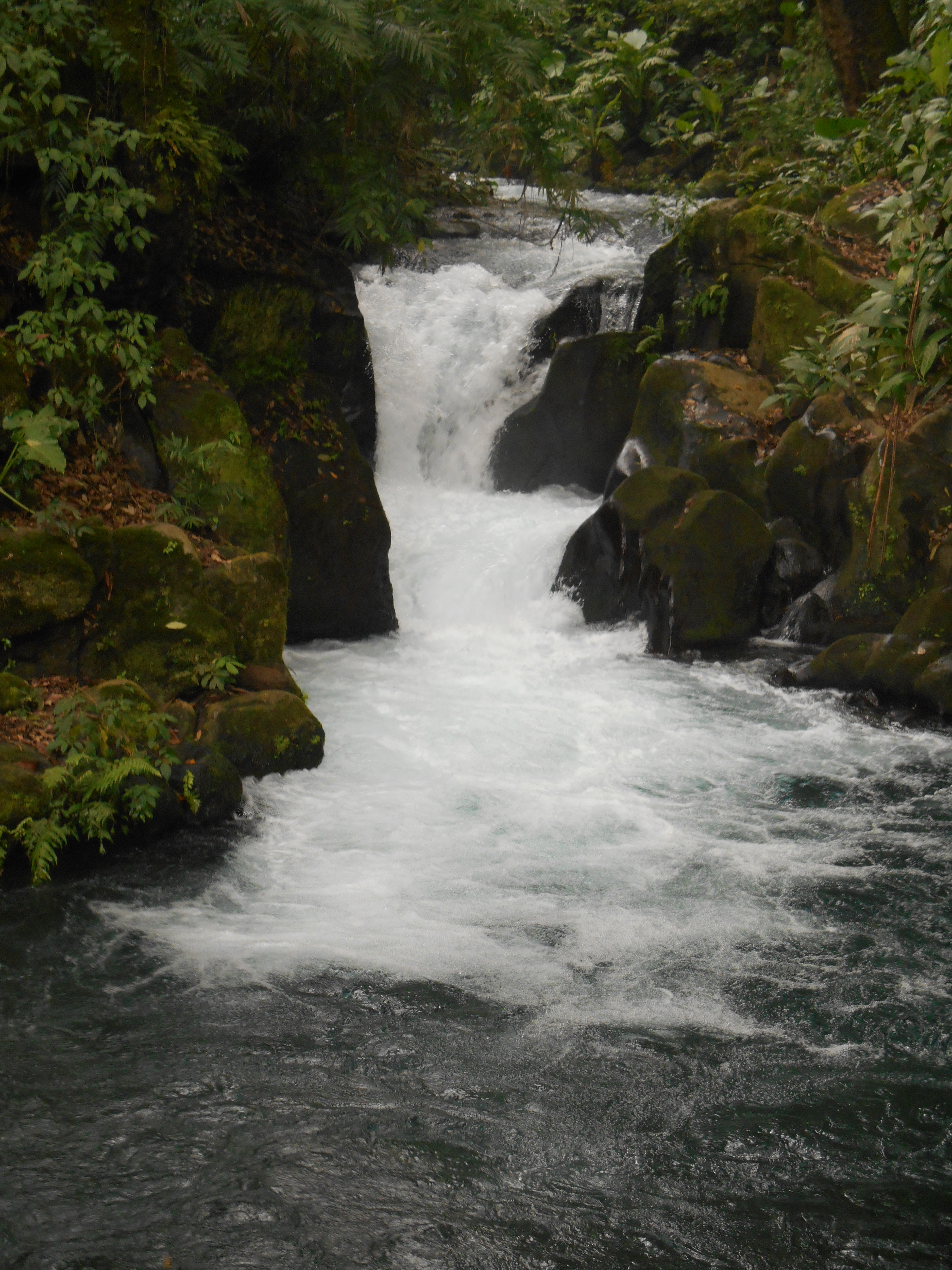 Rio Cupatitzio in the national park, in the Municipality of Uruapan, Michoacán state.